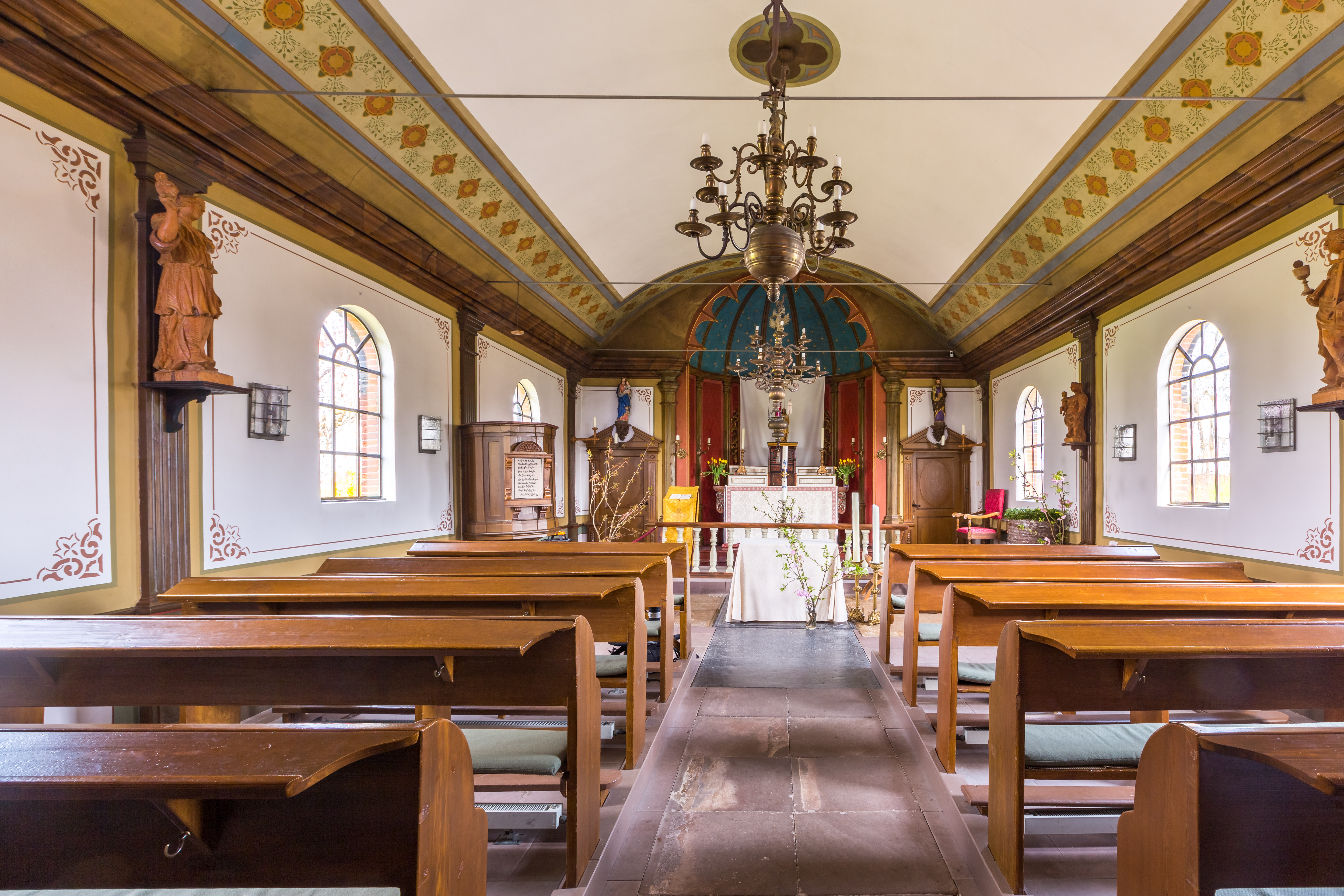 Altkatholische Kirche St. Theresia Nordstrand - Innenansicht Richtung Altar